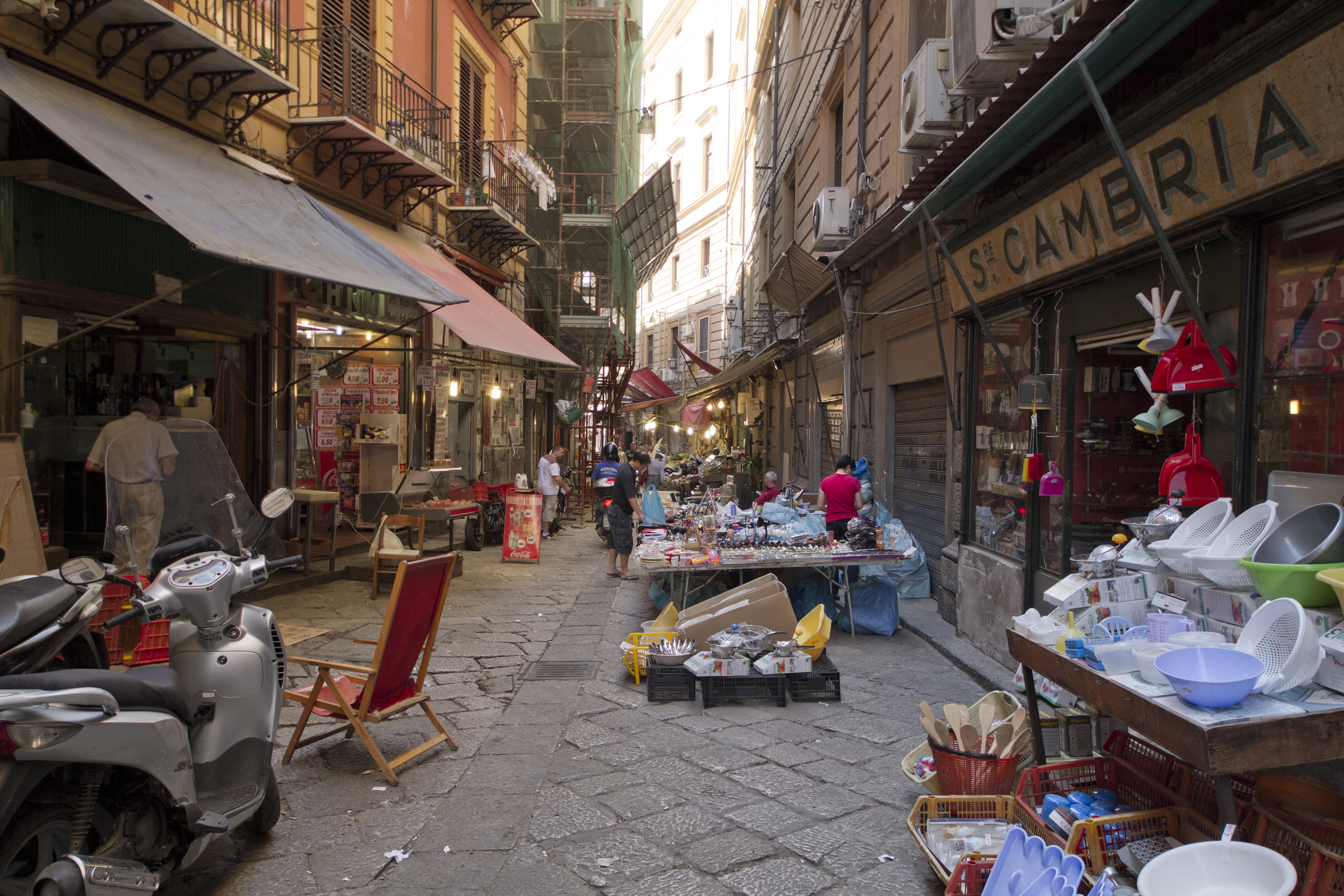 Mercato Vucciria, Castellammare, Palermo, Sicily, Italy